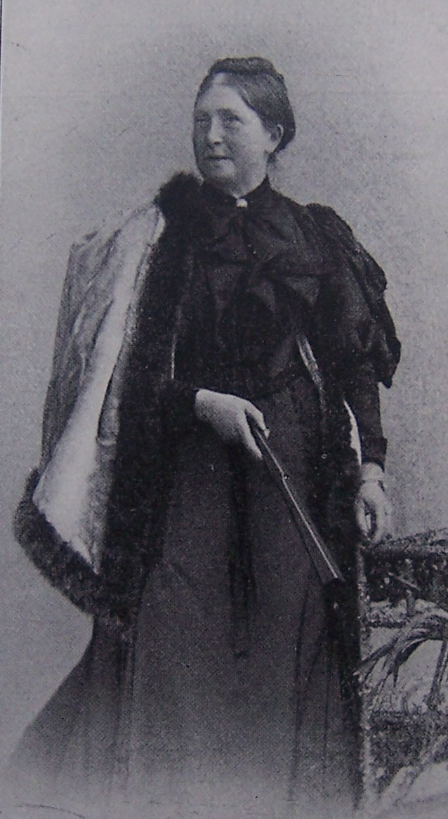 Marie Lipsius (gest. 1927)